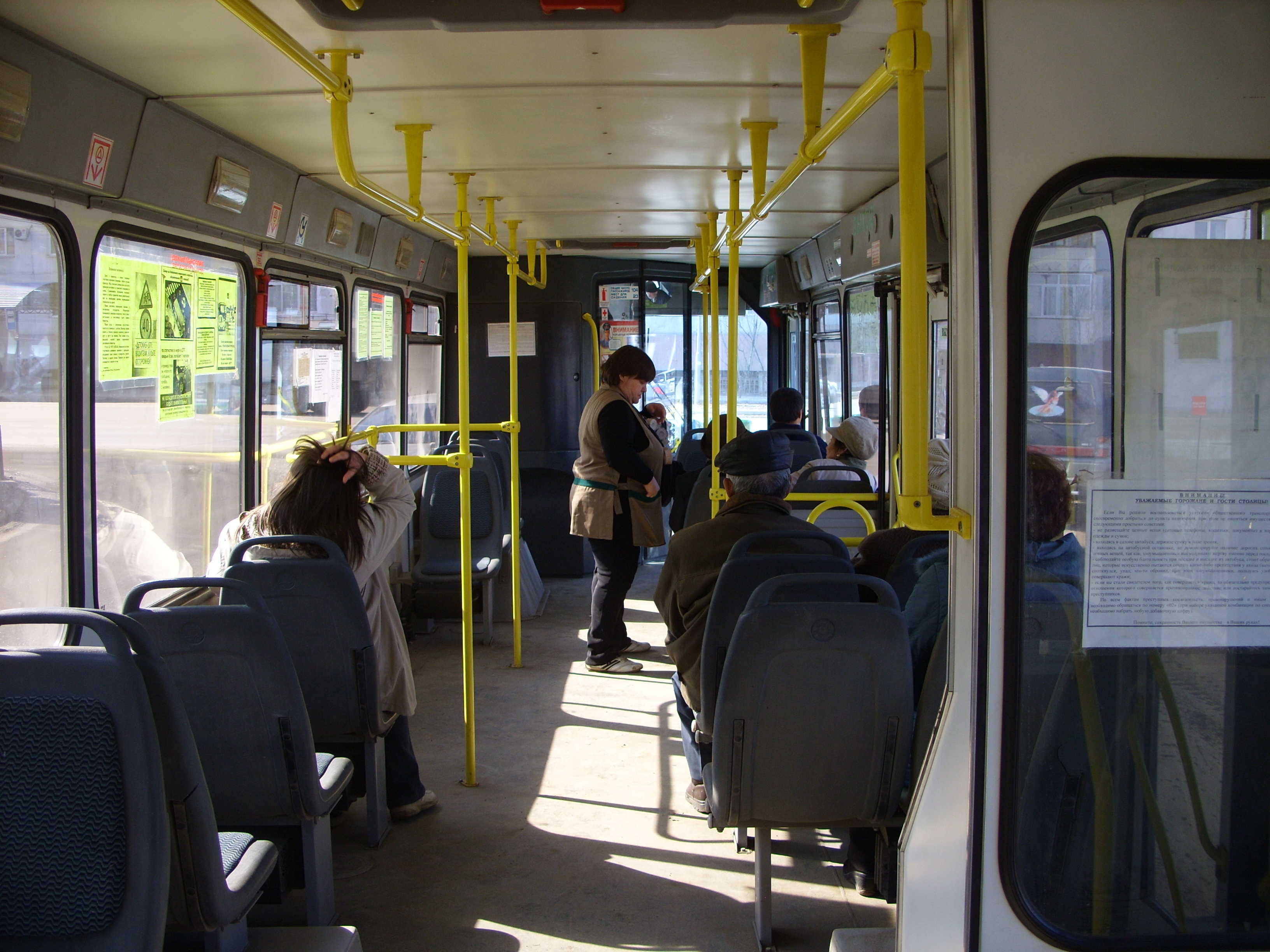 В автобусе ЛиАЗ-5256, маршрут № 7, г. Якутск, 2011 г.